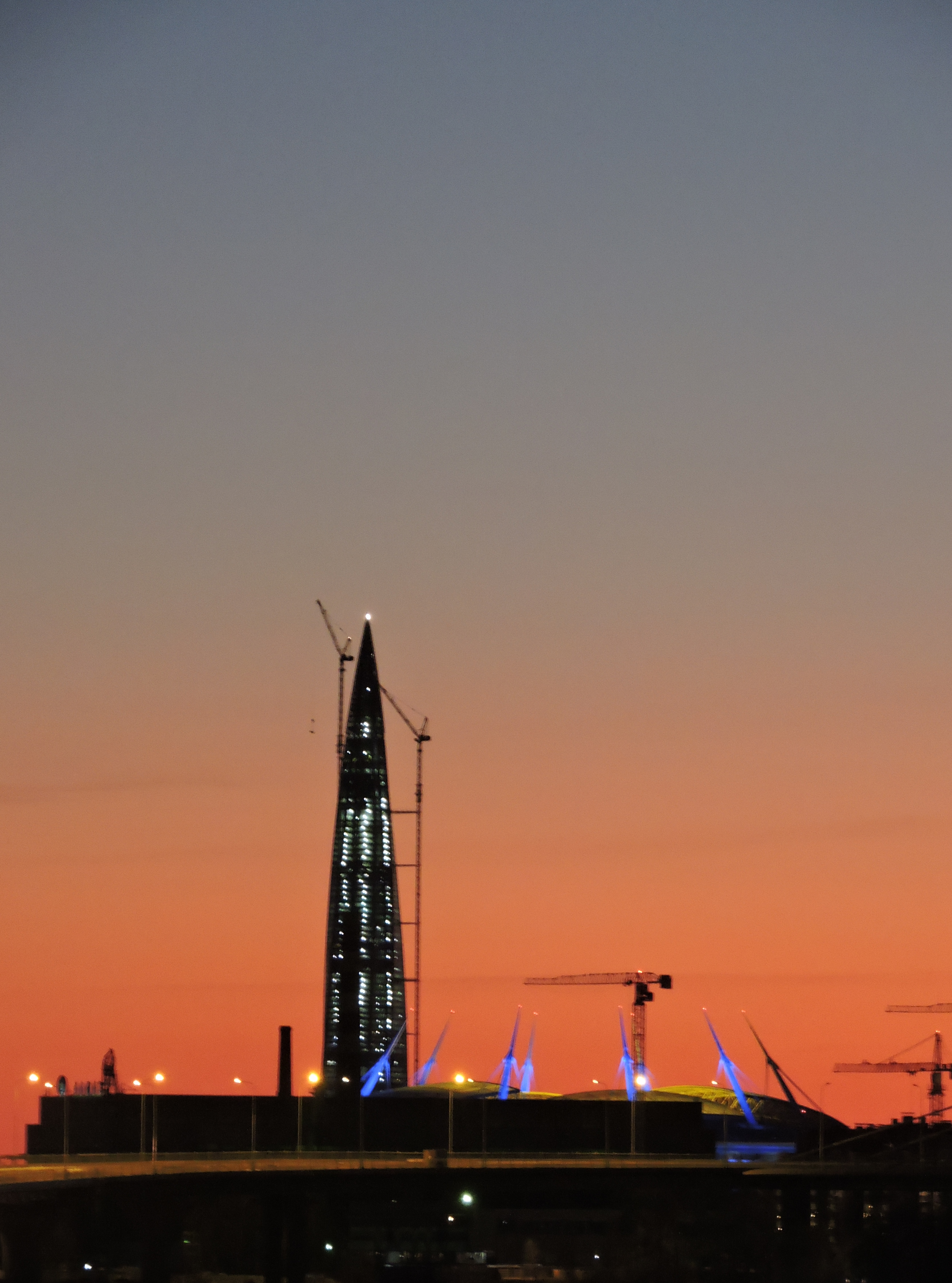 Лахта-центр, стадион «Санкт-Петербург», цех судостроительного завода «Алмаз», мост Бетанкура и башенные краны